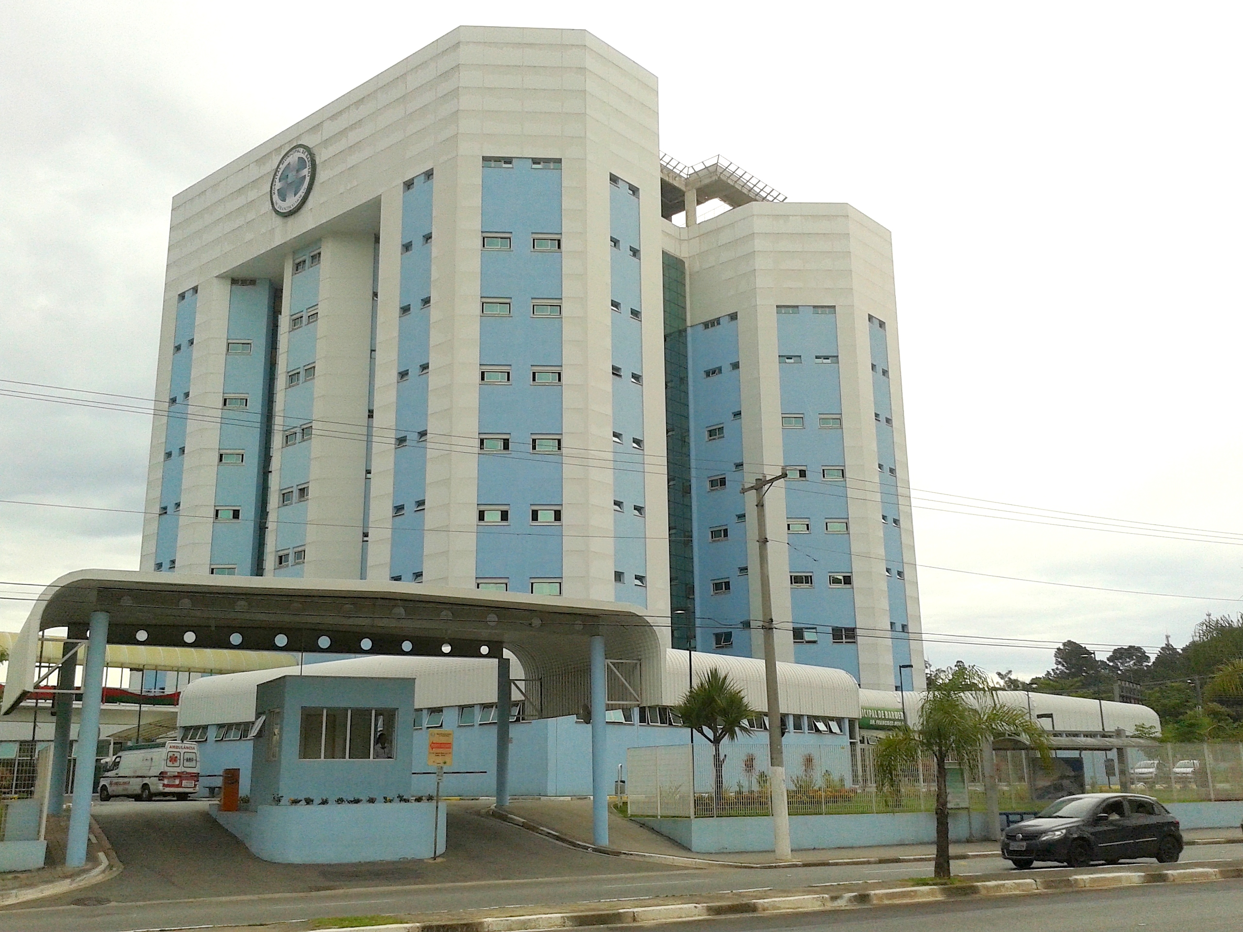 Hospital Municipal de Barueri, SP, Brasil.